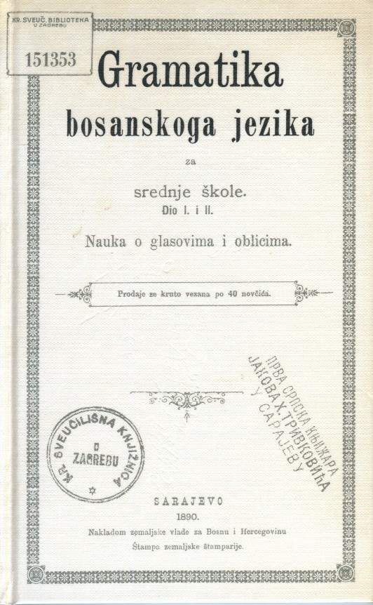 Gramatika bosanskoga jezika za srednje škole.